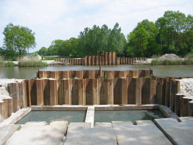 De Doorbraak kruist het Twentekanaal middels een onderleider